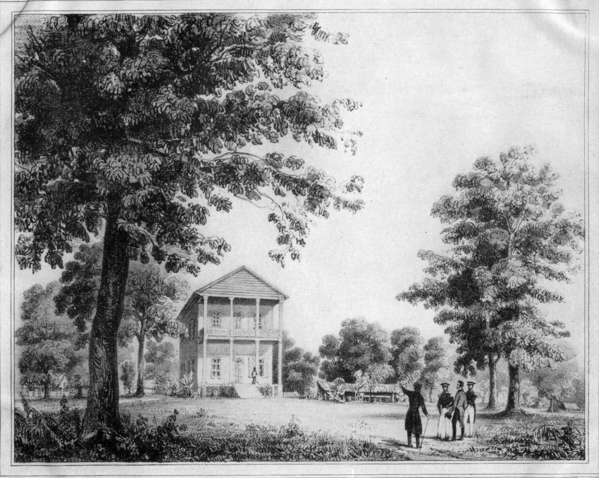 "THE OLD STATE CAPITOL AT TALLAHASSEE. A lithograph by Haumont, in the Comte de Castlenau's Vues et Souvenirs de l'Amerique du Nord, Paris, 1842."